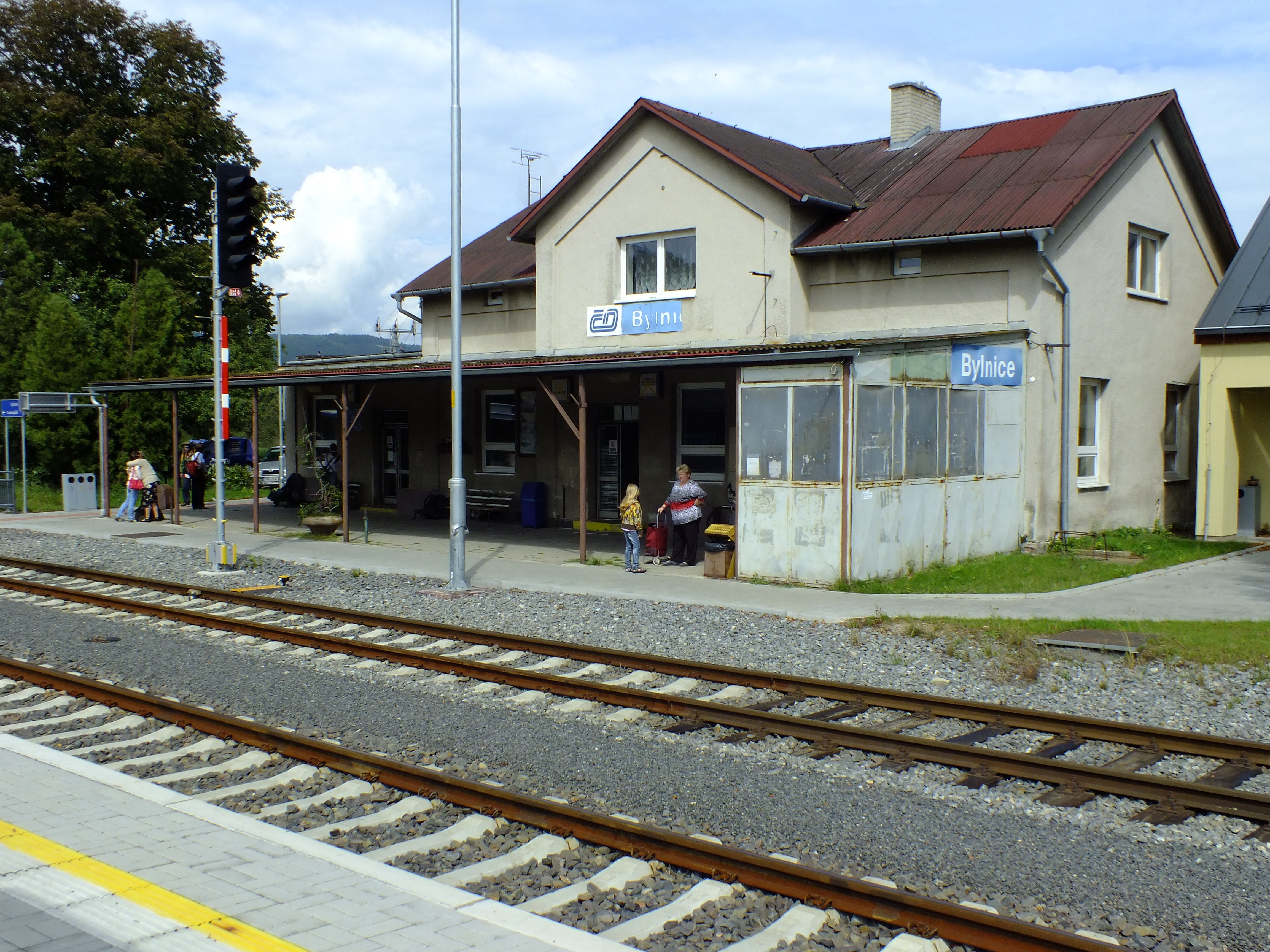 Vlakové nádraží v Bylnici